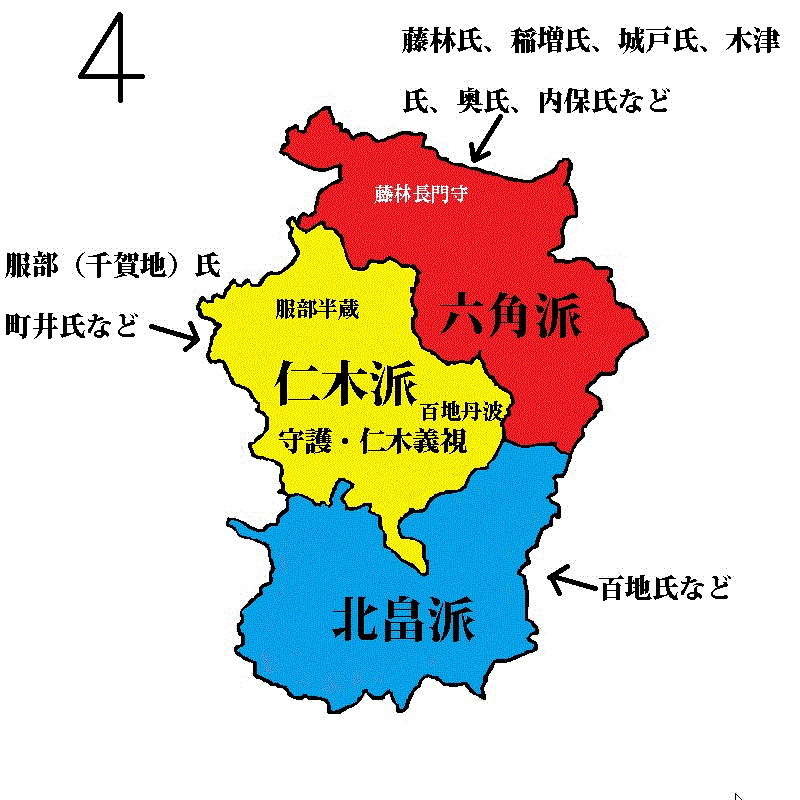 戦国時代 （日本）の伊賀国のおおまかな勢力図です。